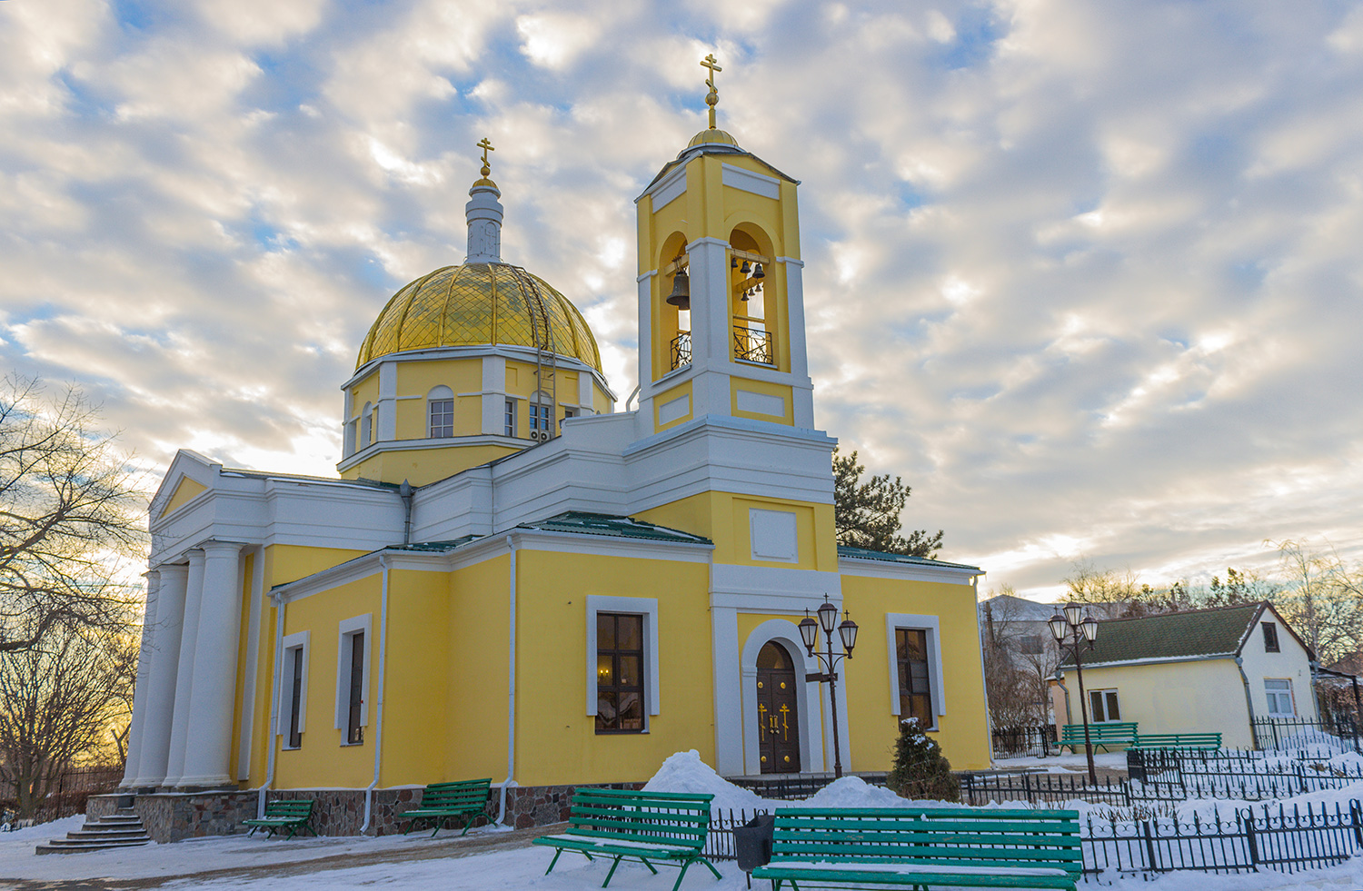 Элистинская и Калмыцкая епархия, 19 февраля 2017, Элиста, ул. С. Радонежского, 97